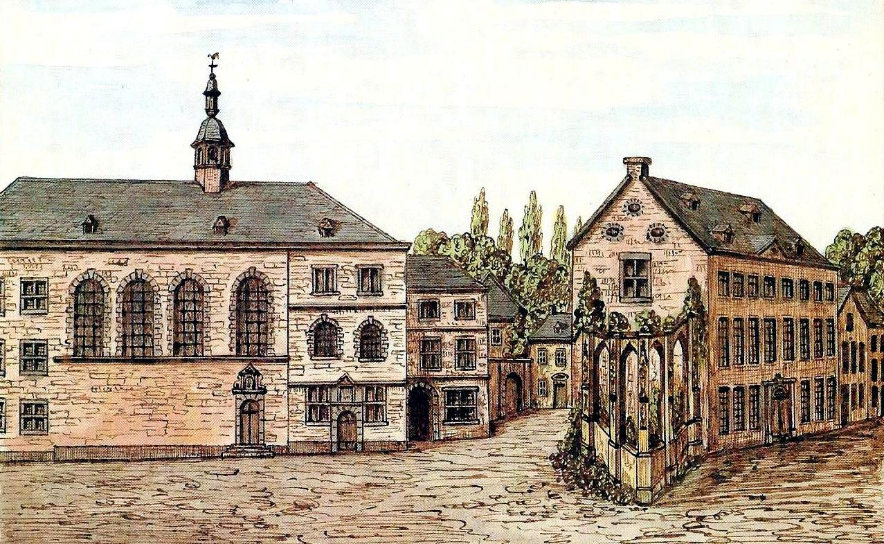 Scan einer alten Lithografie von 1787 des alten Ursulinenklosters in der Aldegundisstgraße (heute Ursulinenstraße) in Aachen mit der Ruine der Aldegundiskapelle rechts am Haus